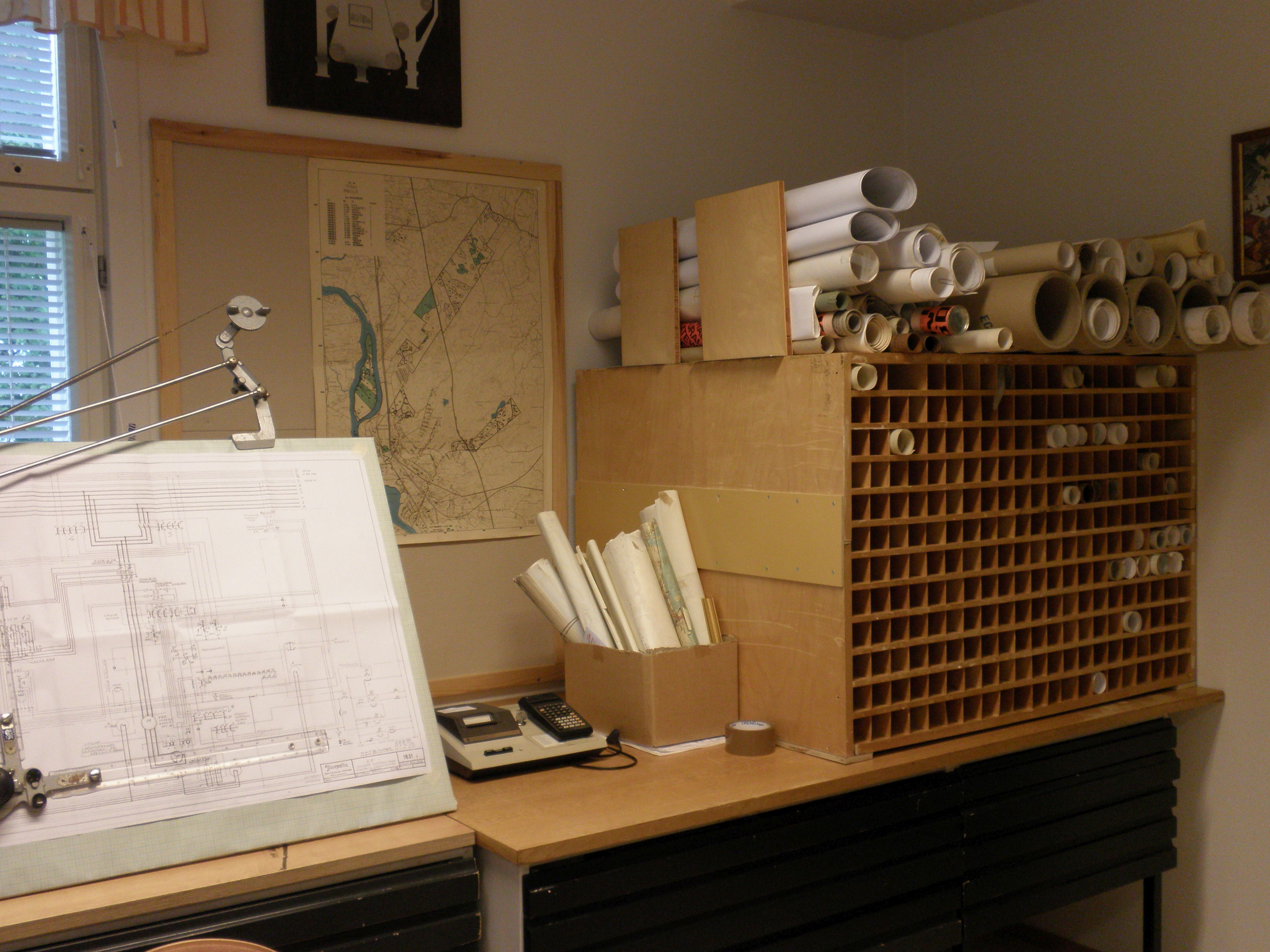 Sisäkuva Piirustuskonttorimuseosta